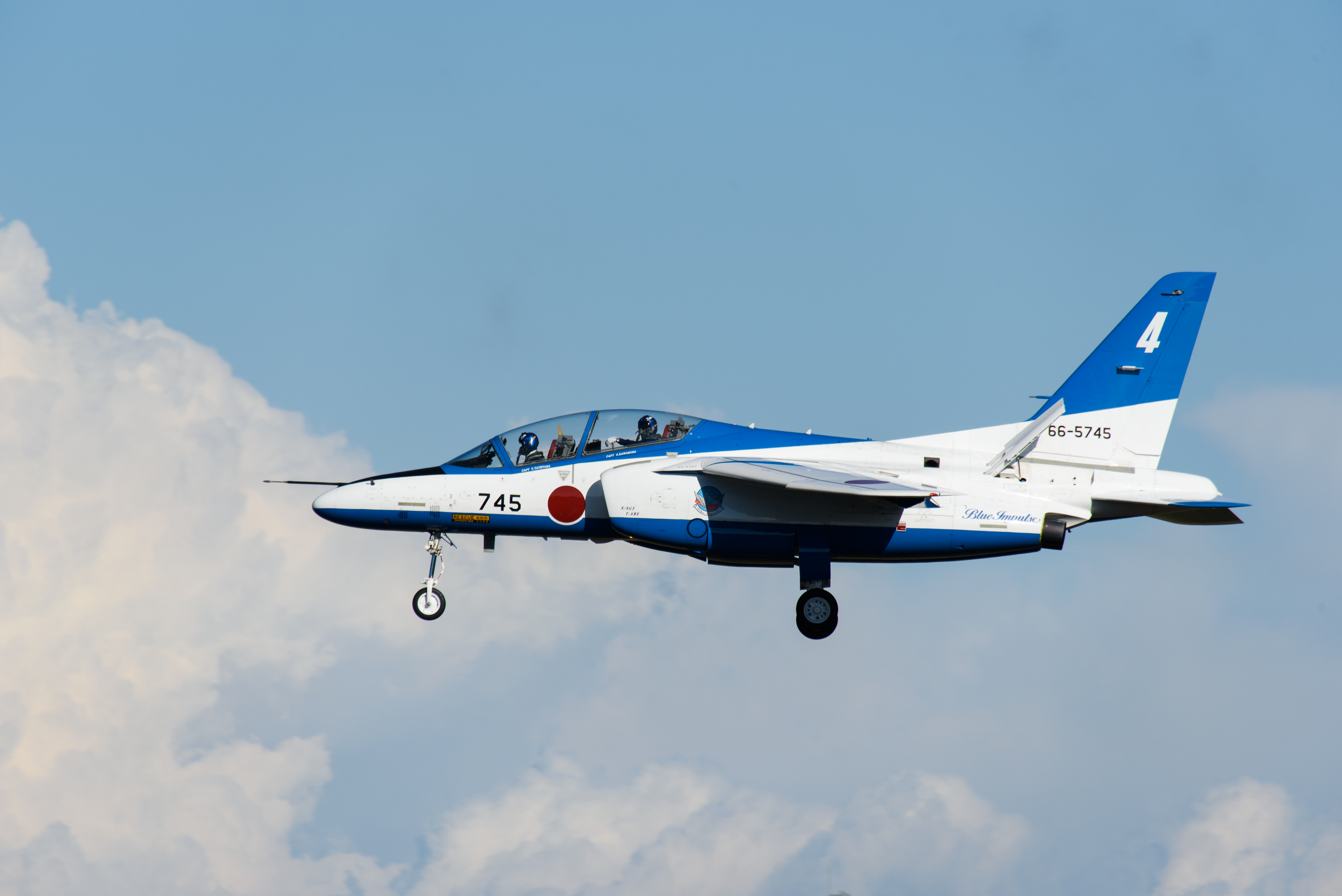 Iruma Air Base Festival 2015